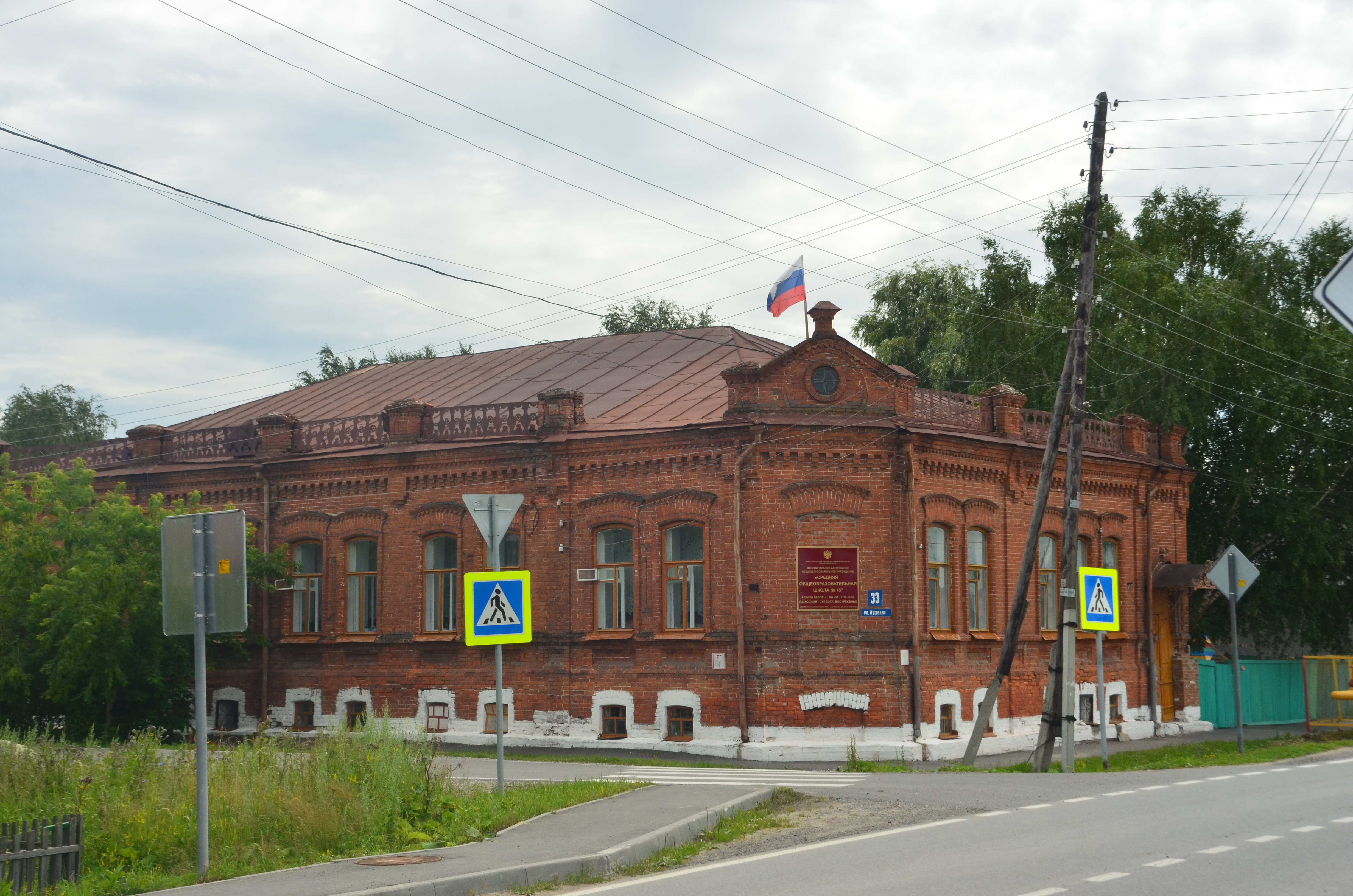 Дом Ченбаевых: улица Пушкина, 33, Тобольск, Тюменская область